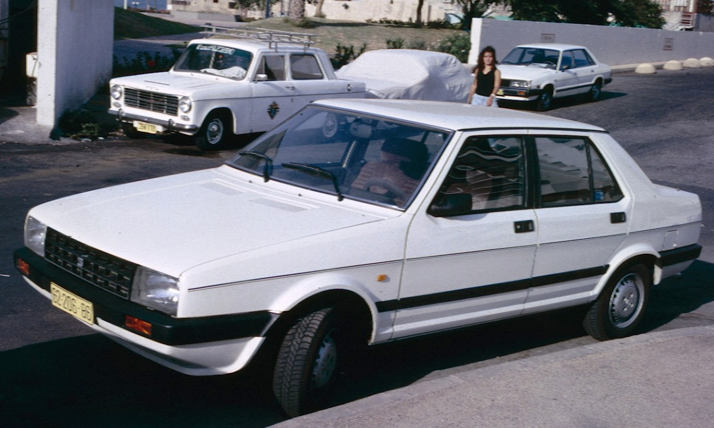 Seat Malaga